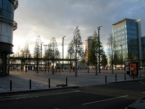 Saint Denis, rue du Landy Jean-Noël Lafargue